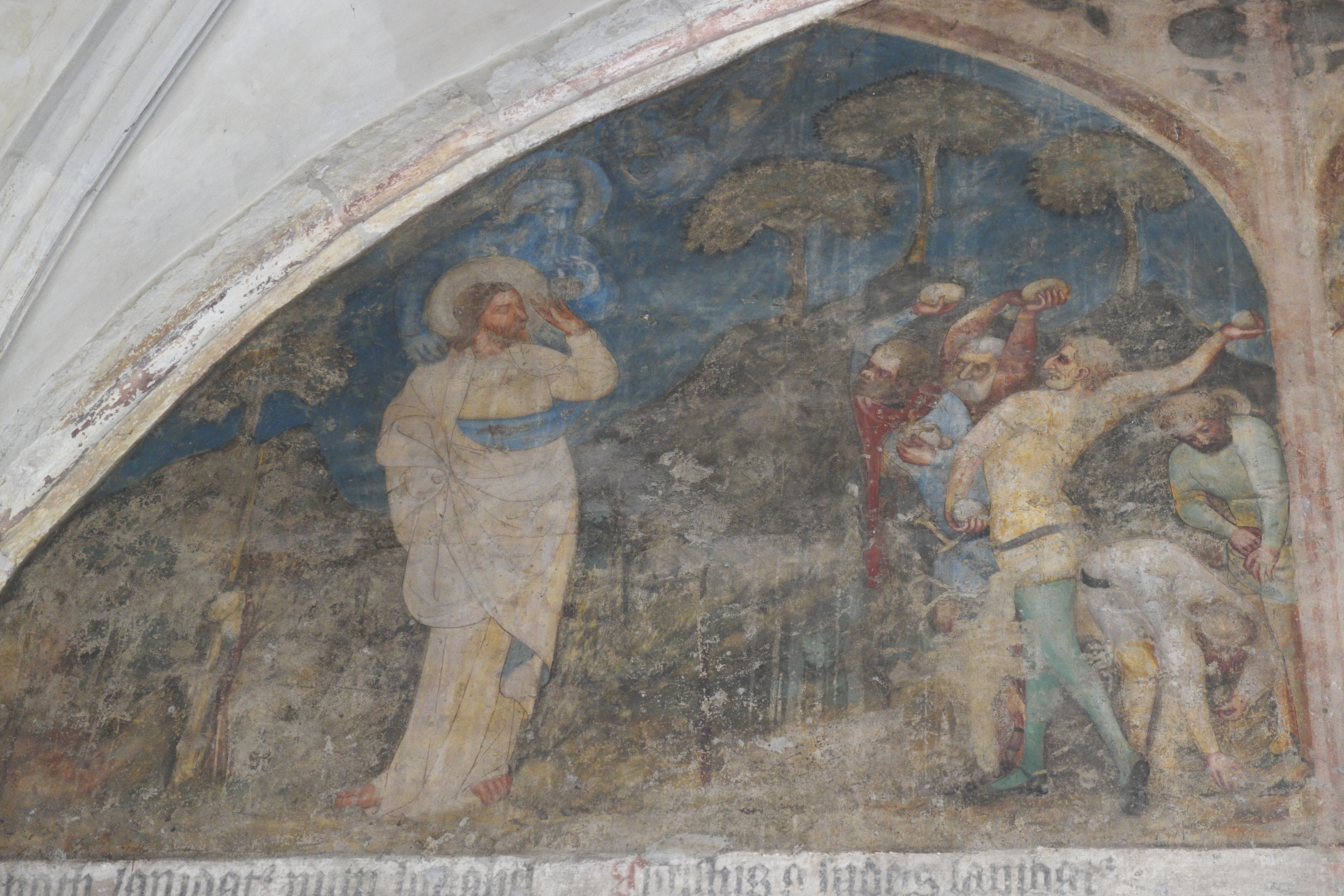 Fresken im Kreuzgang des Emmausklosters in Prag (Tschechien)